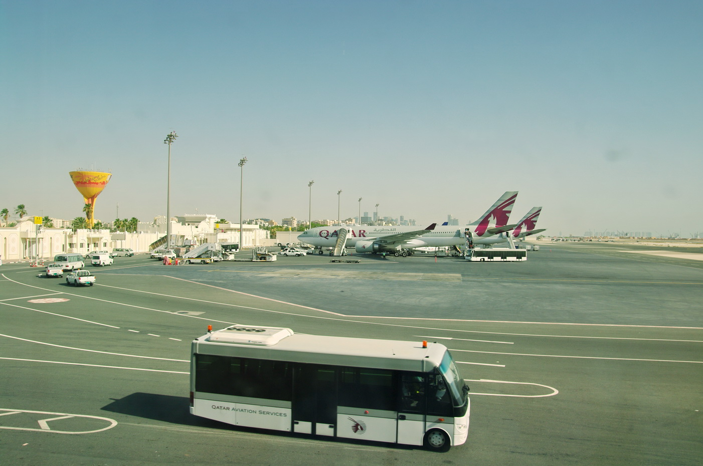 Flughafen Doha, Airbus der Qatar Airways bei der Abfertigung